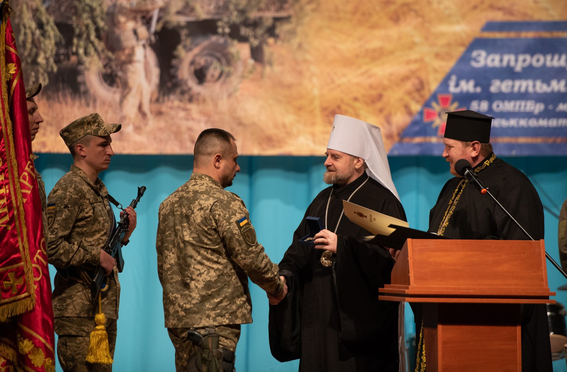 Митрополит Іоан та комбриг 58 бригади Дмитро Кащенко